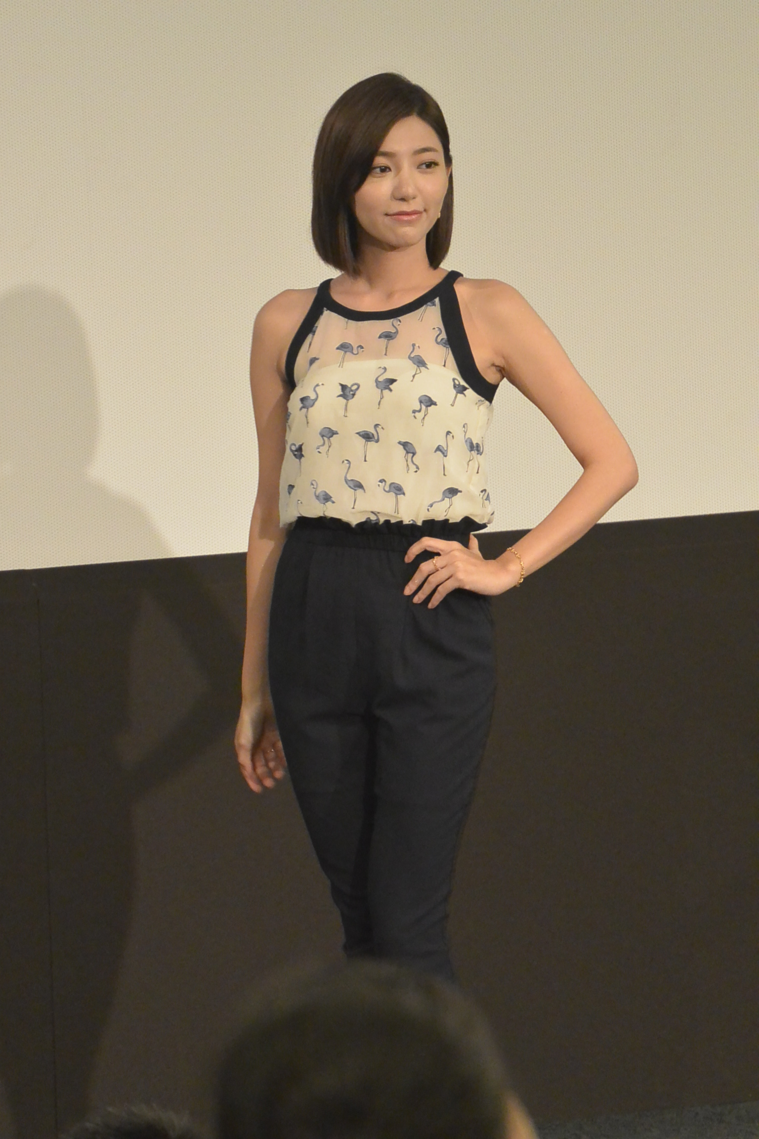 2014/07/13 華流7月號 雜誌簽書會